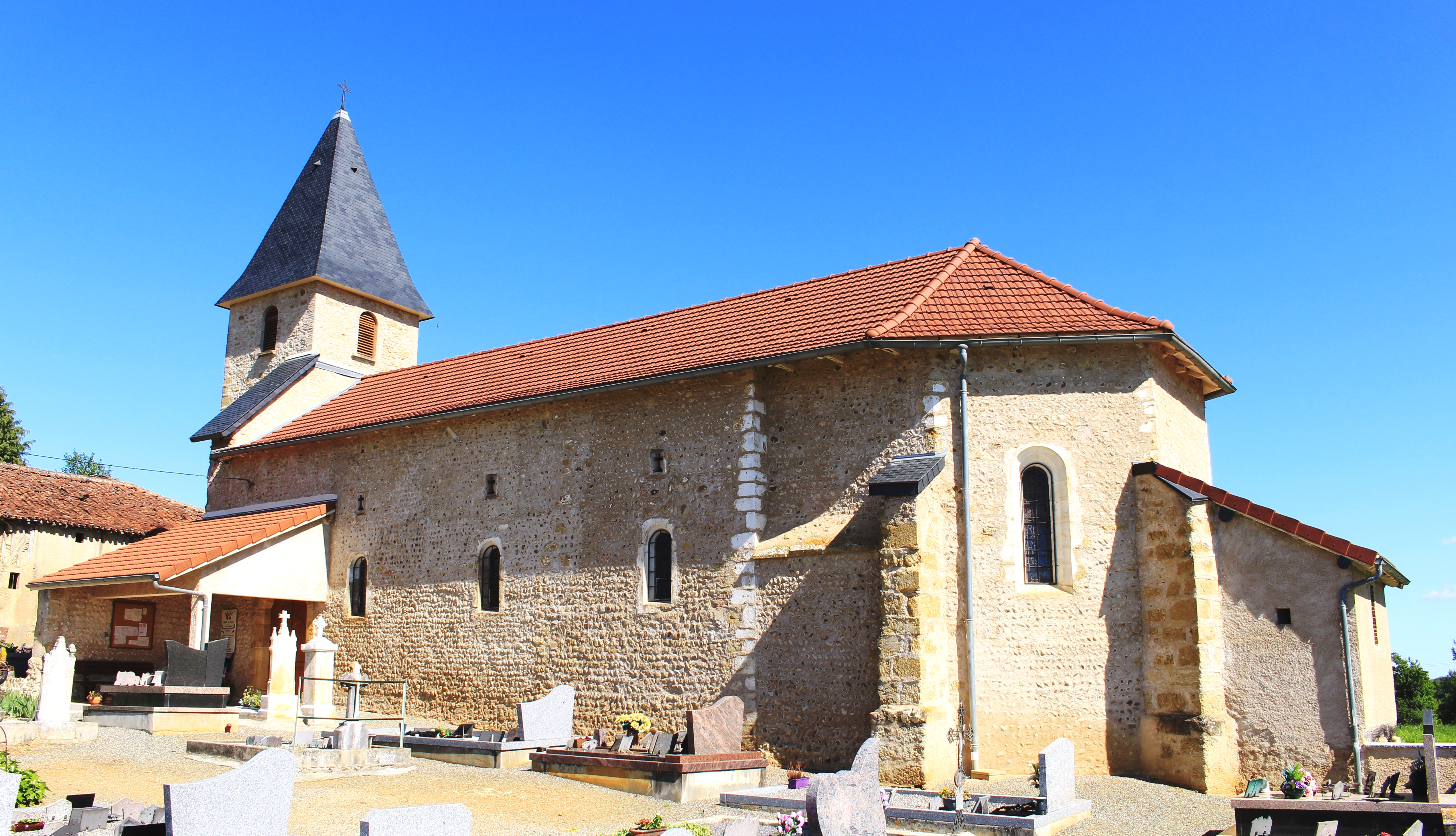 Église Saint-Pierre de Lalanne-Trie (Hautes-Pyrénées)